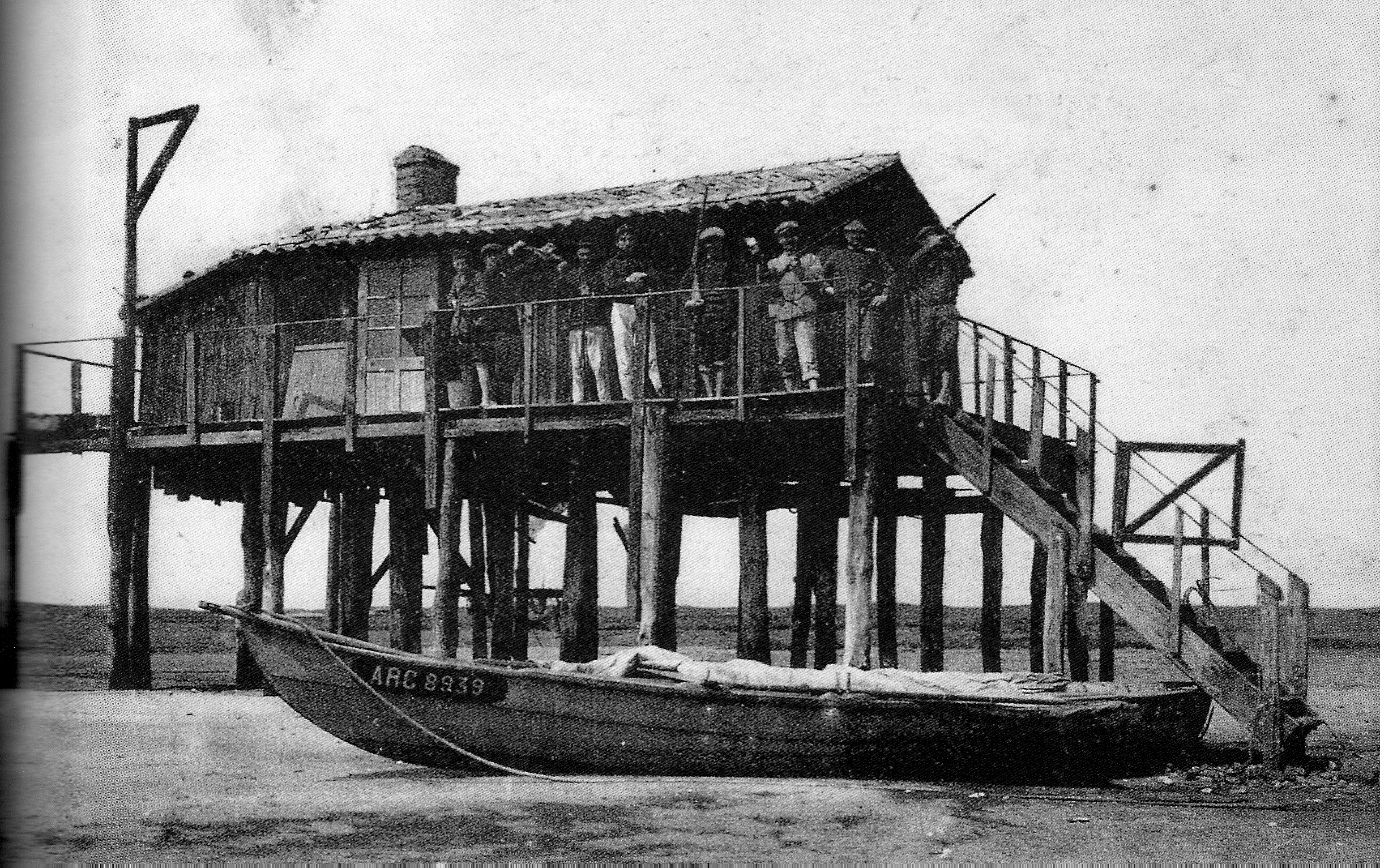 Pinasse à voile au pied d'une cabane tchanquée sur le bassin d'Arcachon (Aquitaine)